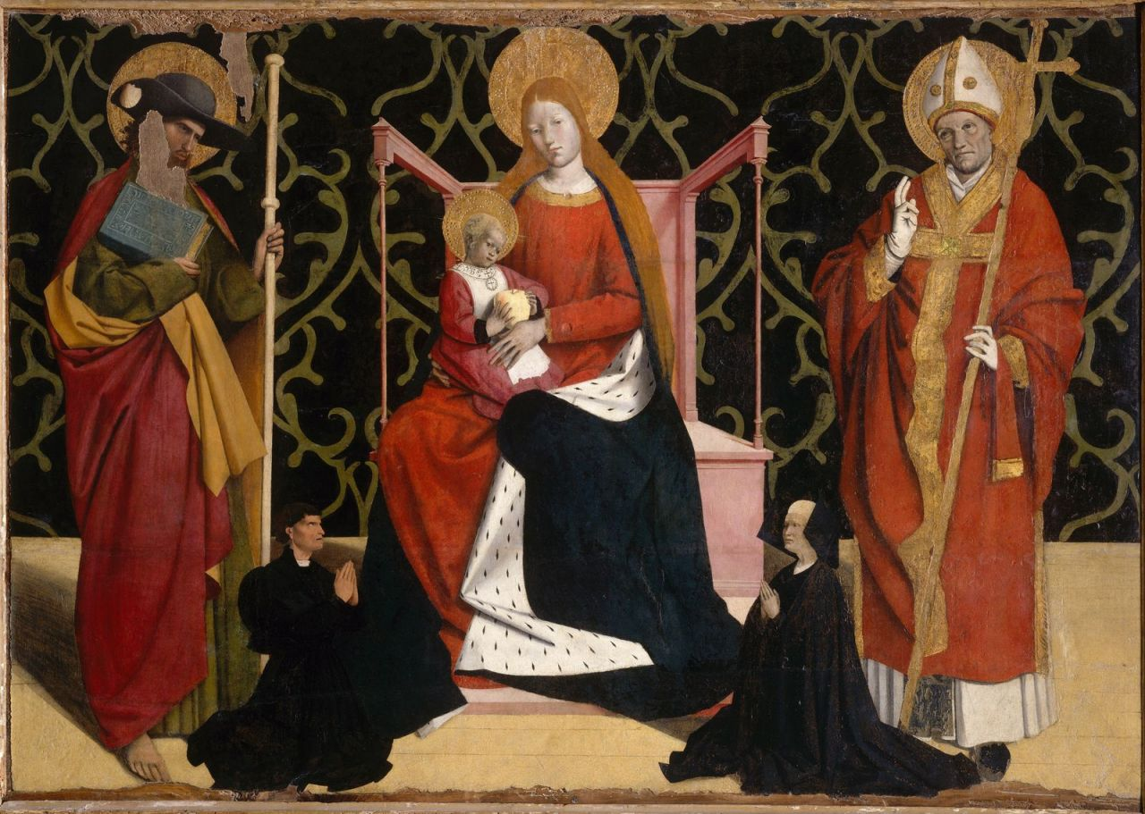 Retable Requin 1444-1445 Musée du Petit Palais, Avignon